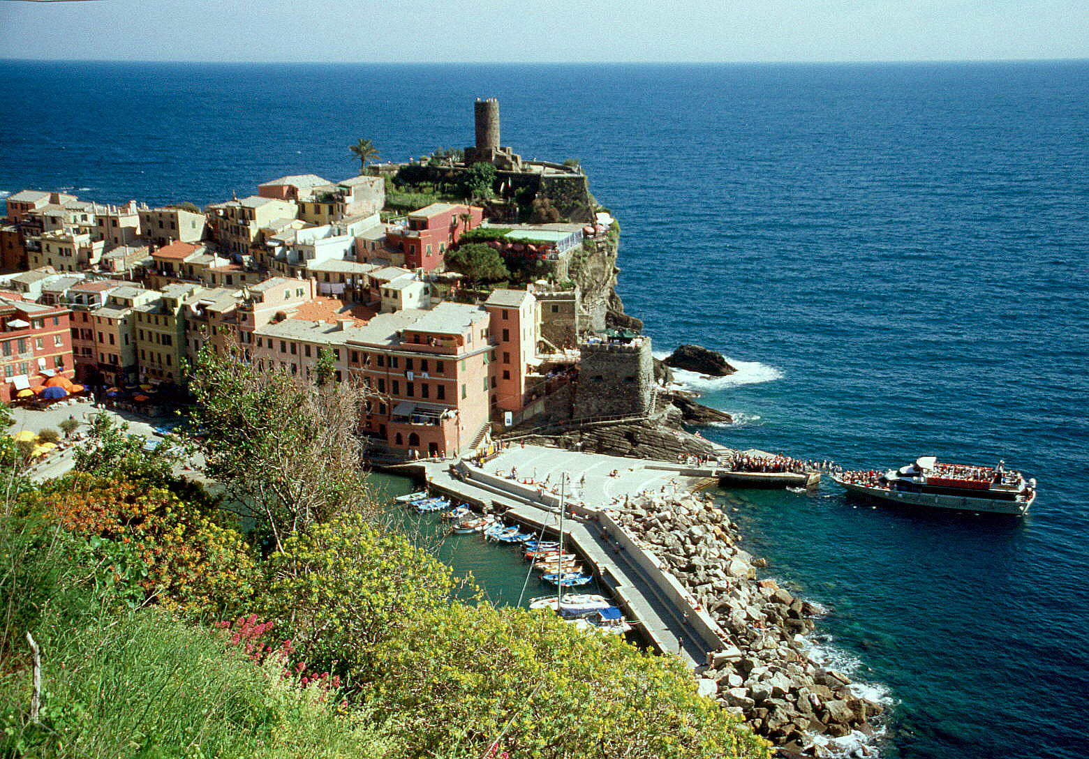 Vernazza 2004